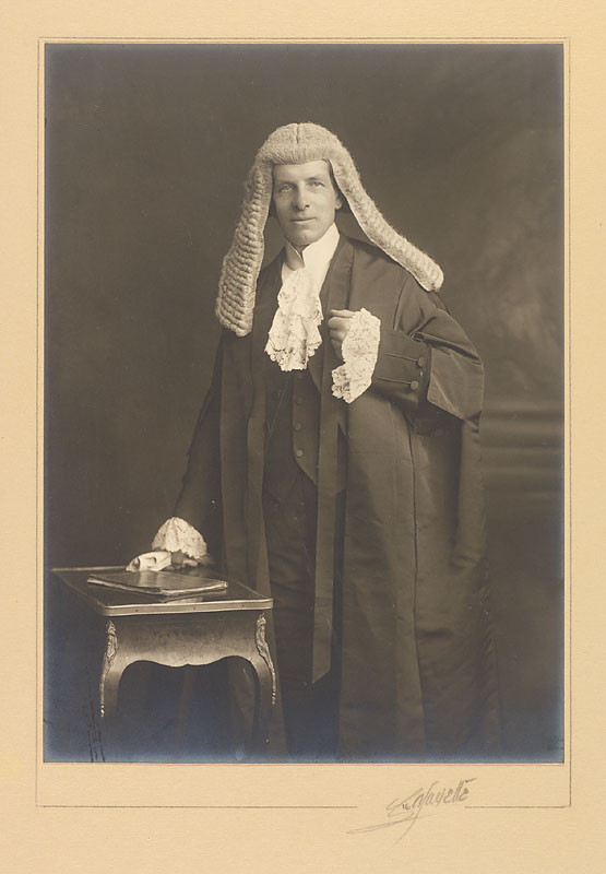 Sir Malcolm Macnaghten (1869-1955)